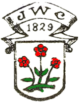 J.W. Cappelens forlags våpen